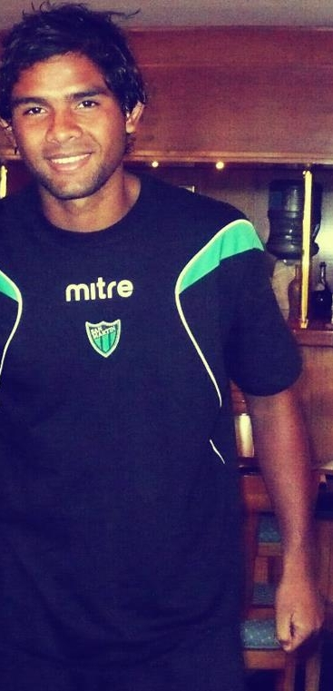 Imagen del Futbolista